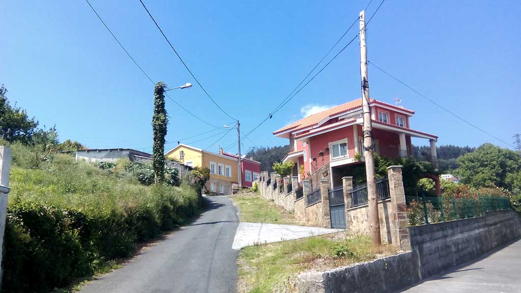 Accesos á Barca.